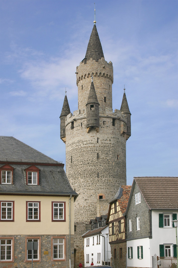 Adolfsturm in Friedberg (Hessen) in Deutschland.